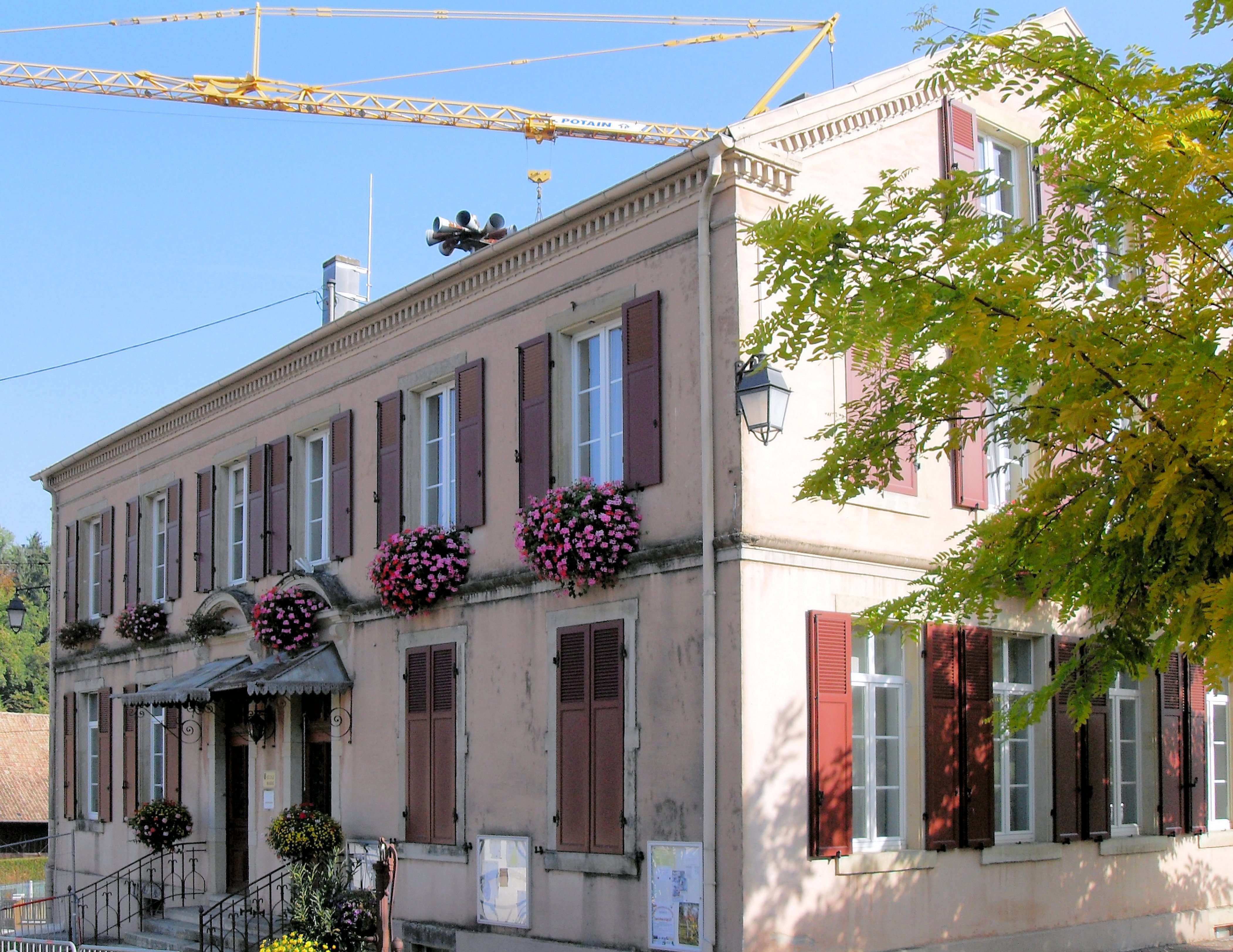 La mairie-école de Fulleren